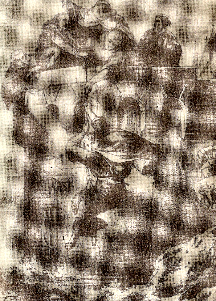 Ucieczka Władysława Łokietka z Krakowa w czasie zdobywania miasta przez Henryka Probusa, rys. Aleksander Lesser, 1884.